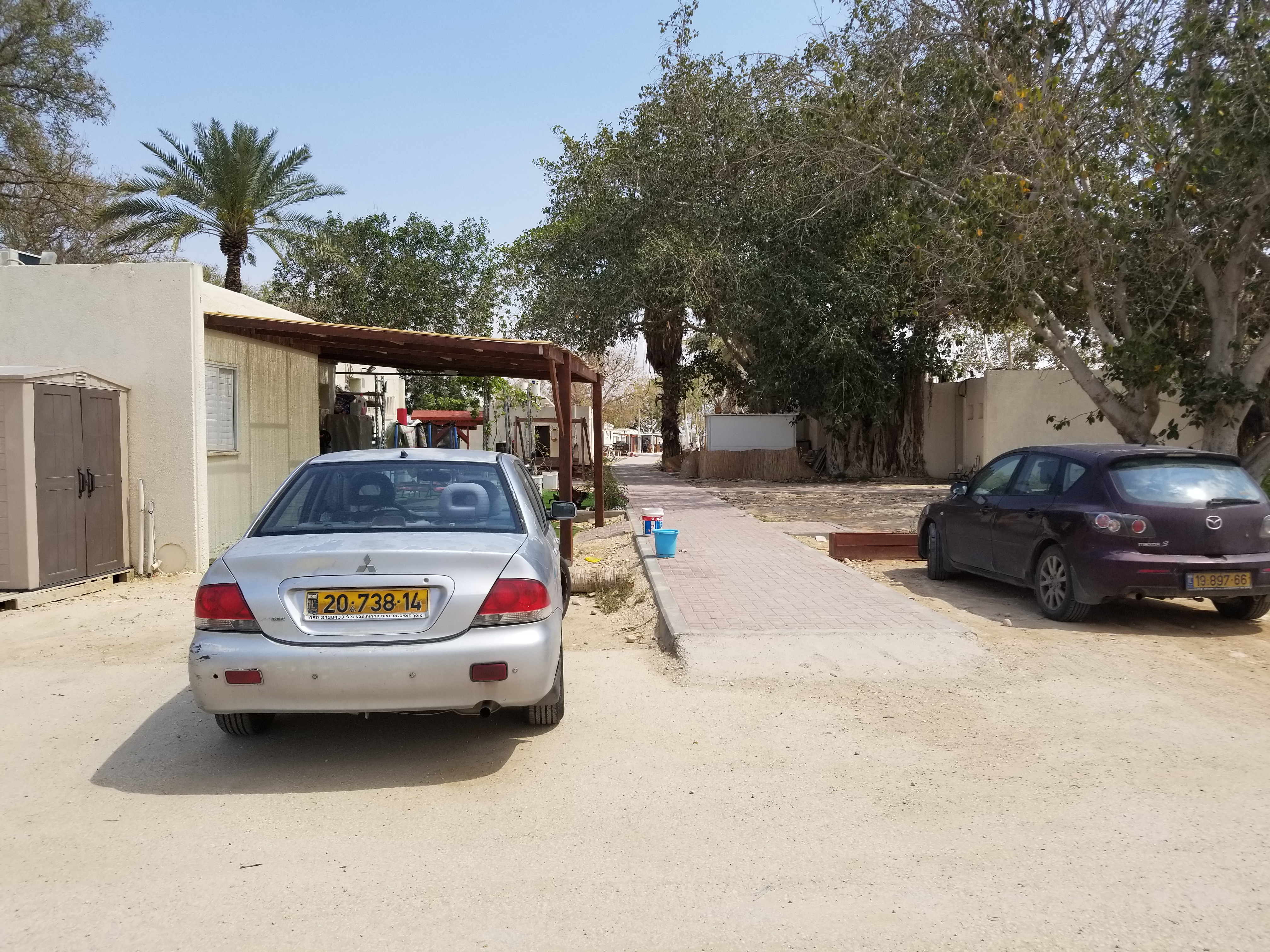 היישוב קדם ערבה